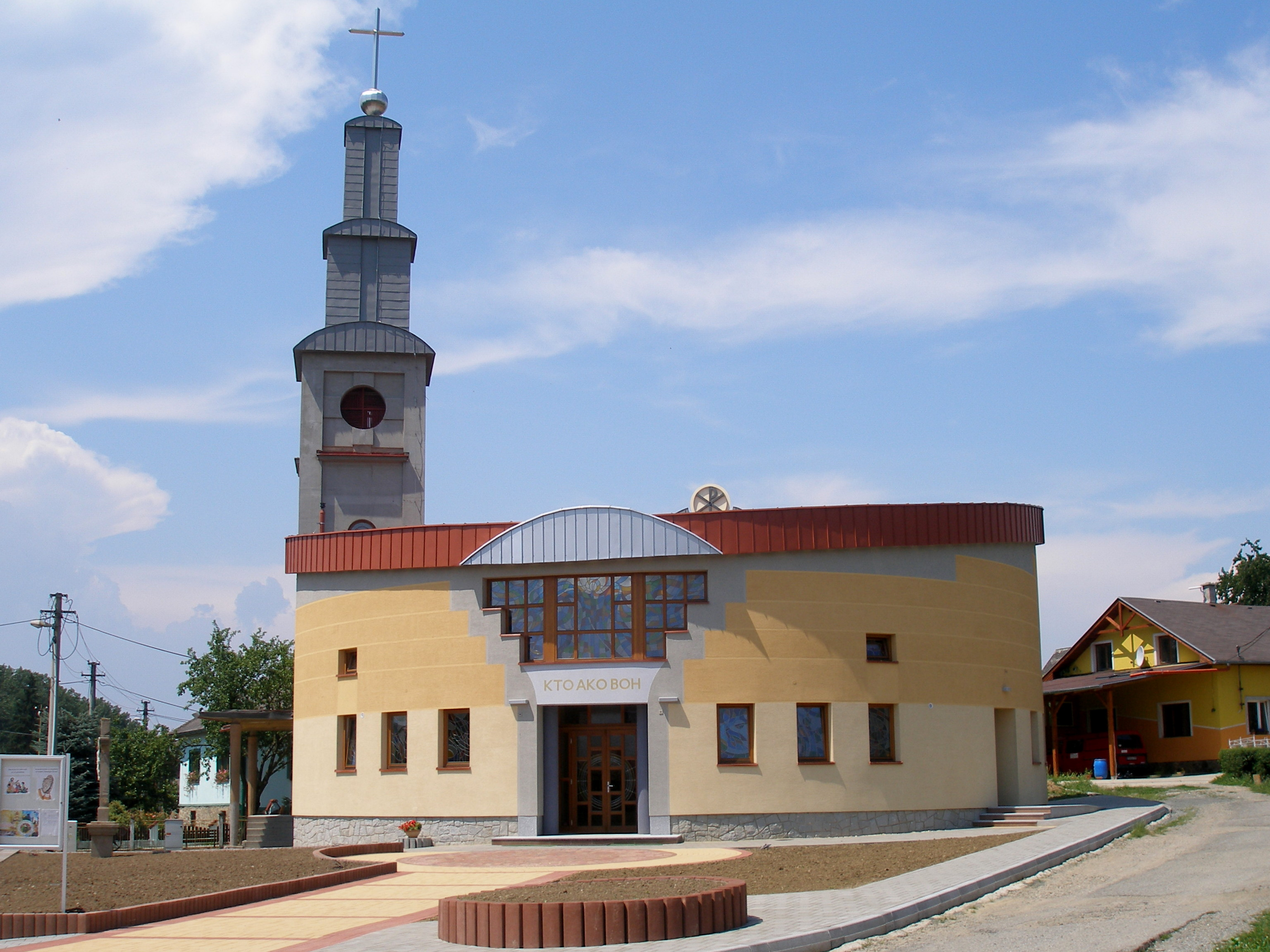 Obec Dulová Ves okres Prešov. Región Šariš.